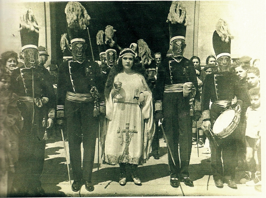 Granaderos Virgen de la Soledad de la Semana Santa del Cabañal (1925)